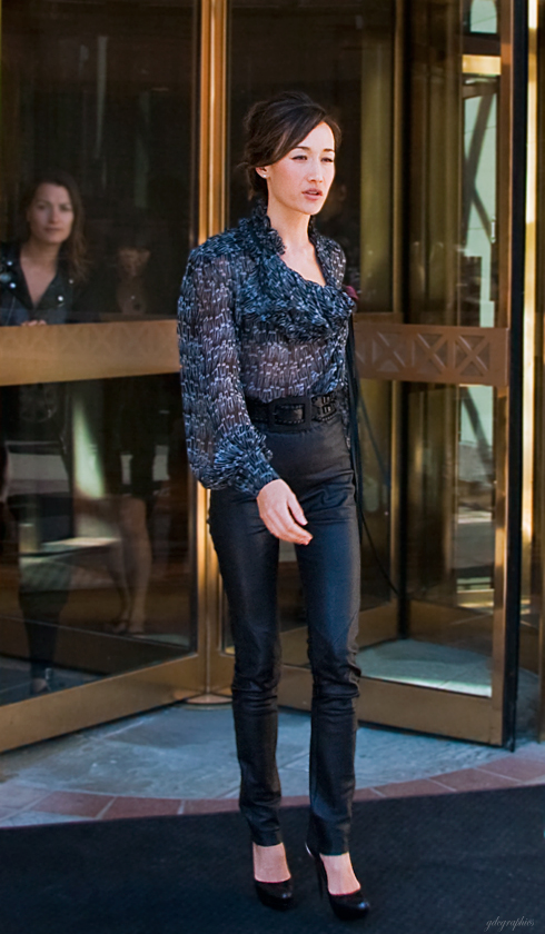 Toronto International Film Festival 2009